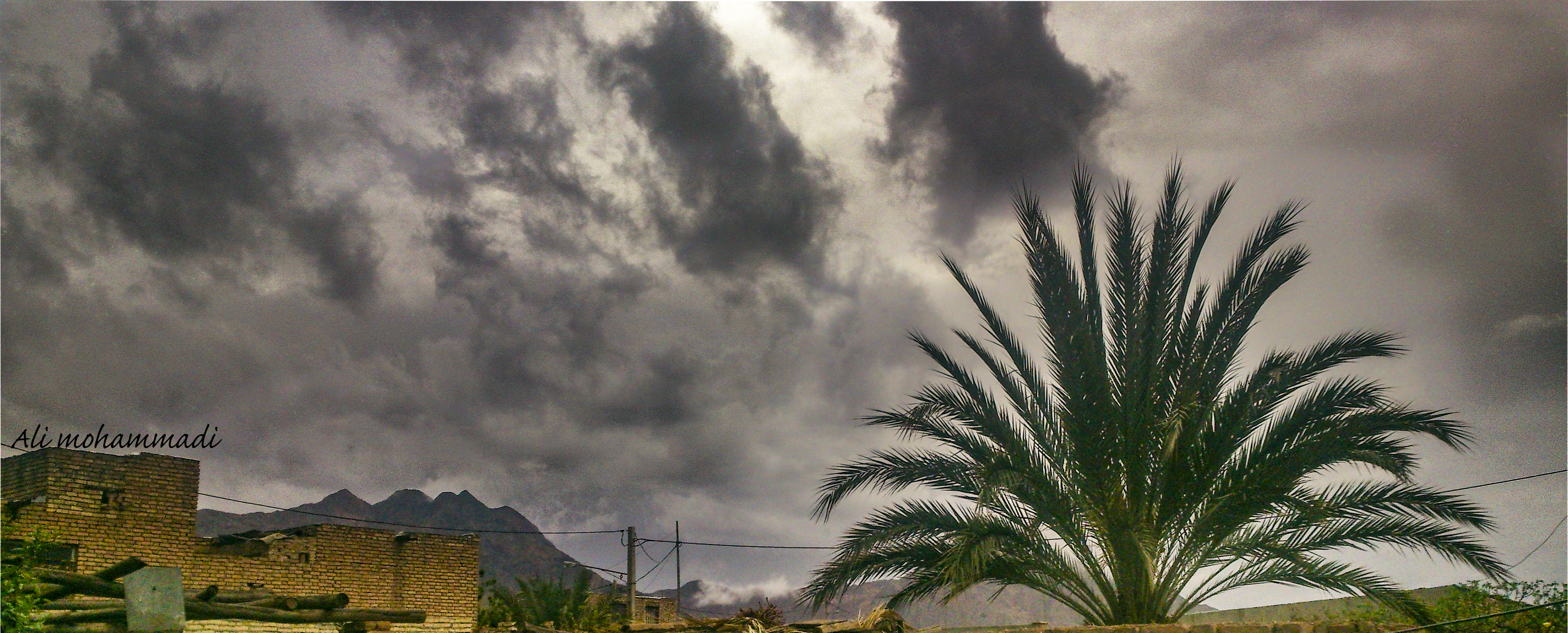 هوای ابری و بارانی پاییز ساغند